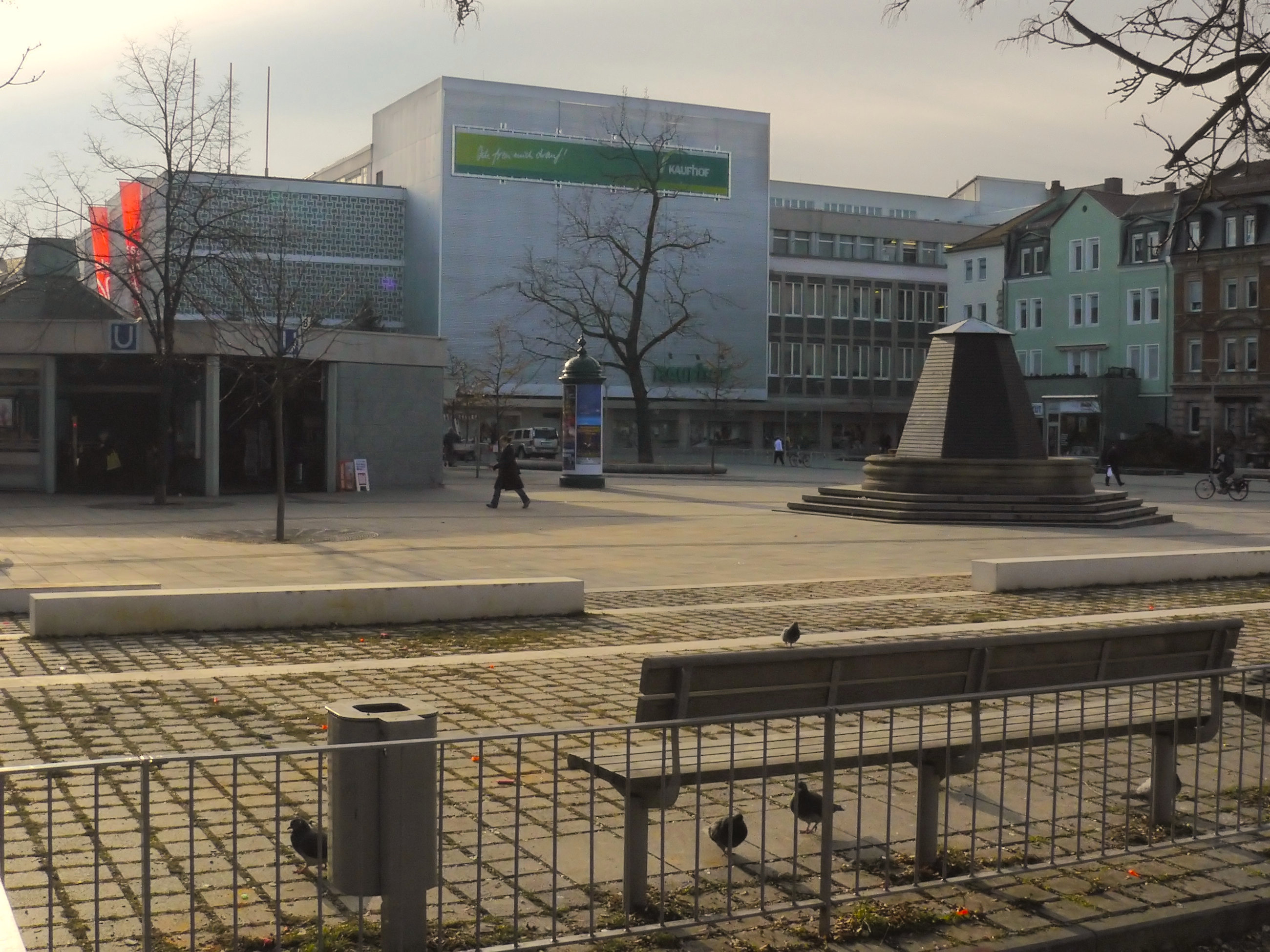 Aufseßplatz Nürnberg mit Zugang zum gleichnamigen U-Bahnhof